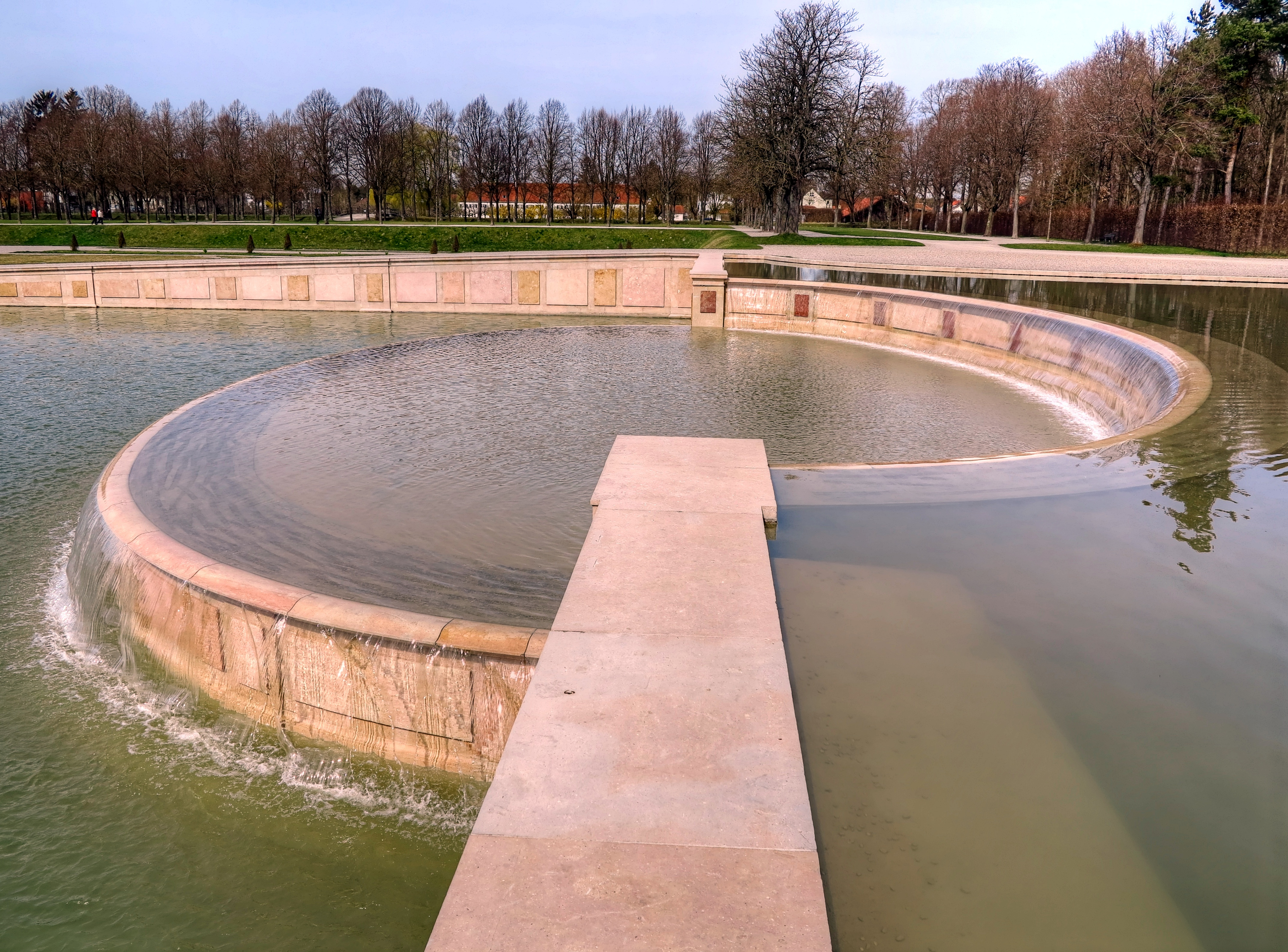 Deutschland, Bayern, Oberschleißheim, Schloß Schleißheim, Brunnenanlage